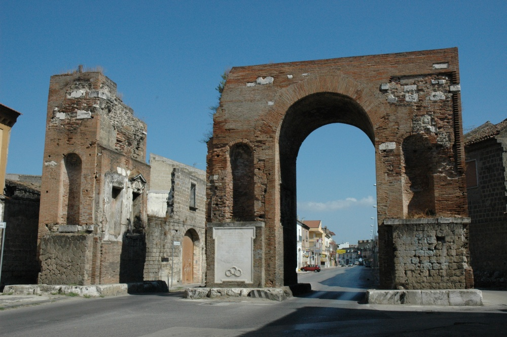 Ehrenbogen Arco die Adriano.